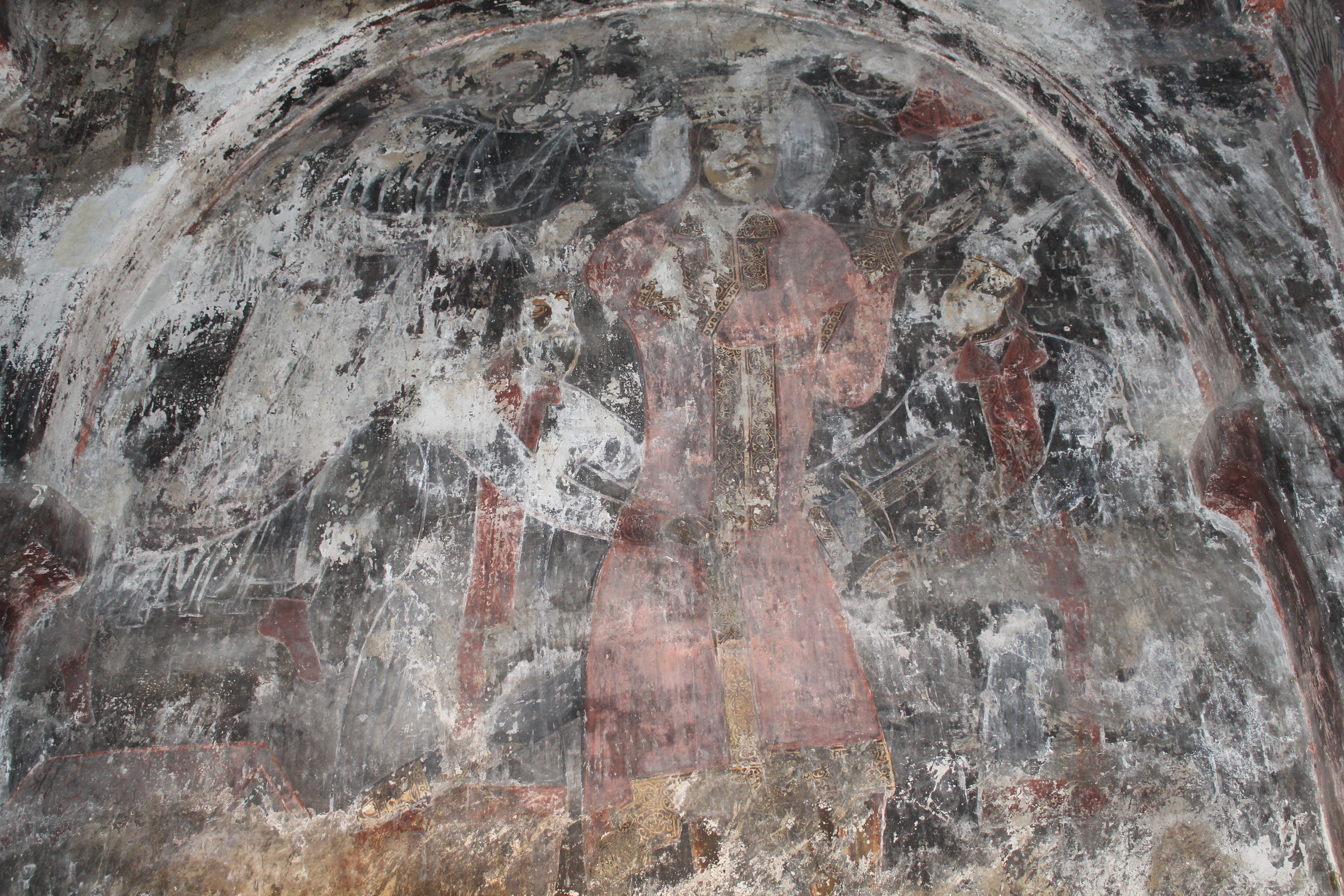 მაცხვარიშის მაცხოვრის ეკლესია